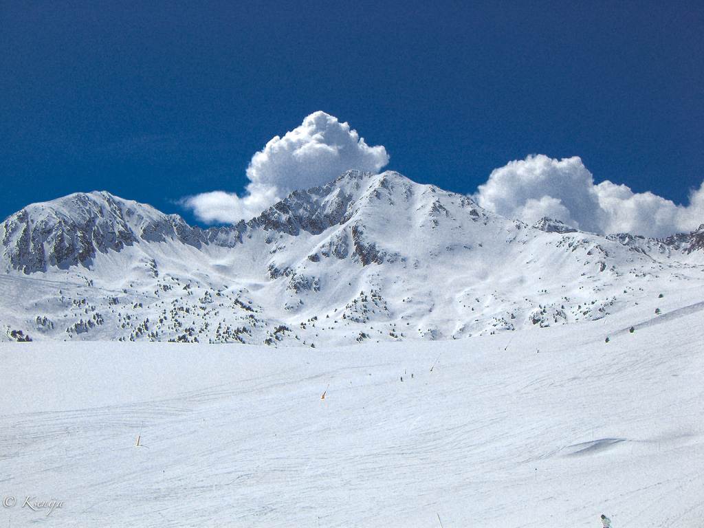 Andorra